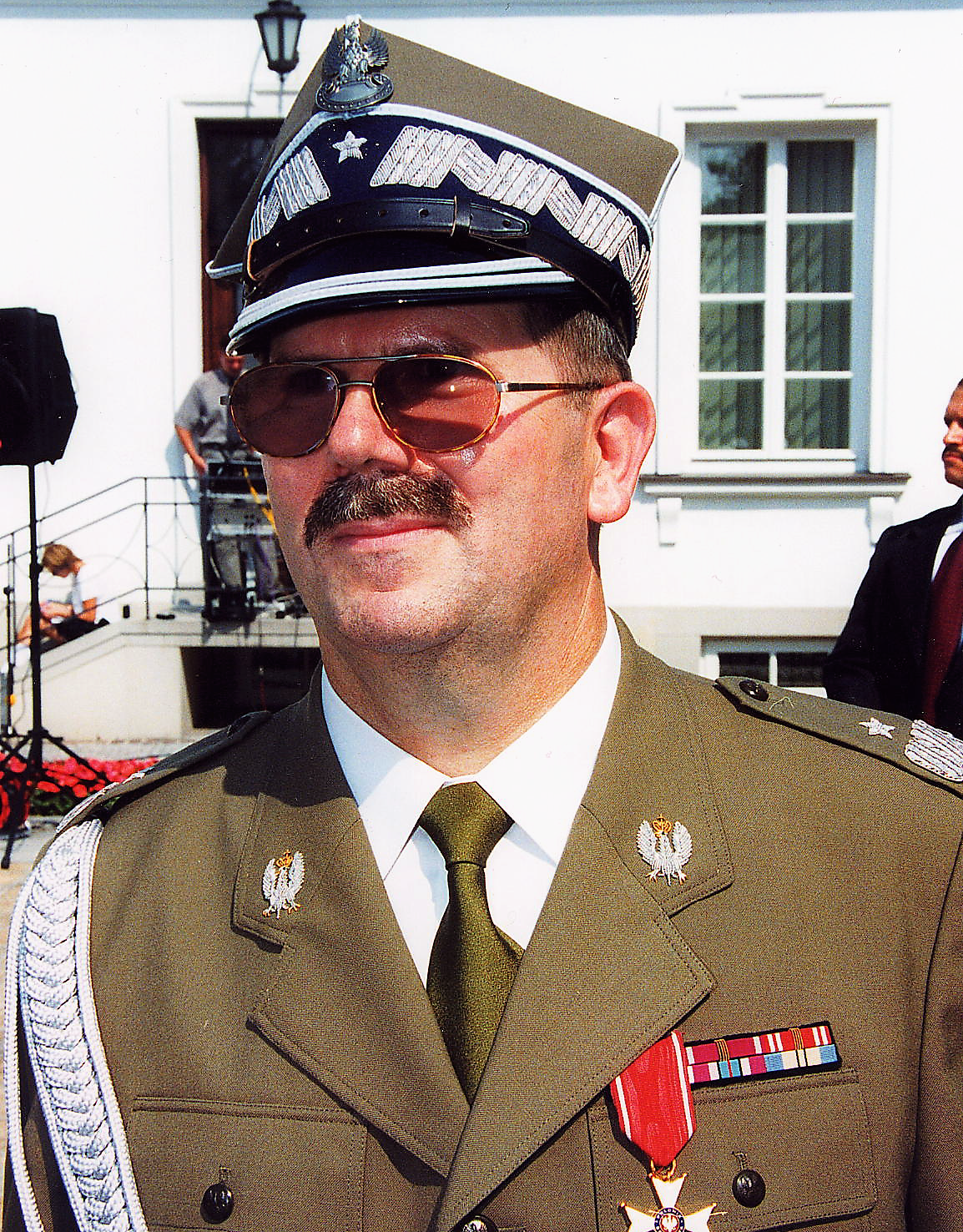 Gen. bryg. dr Kazimierz Sikorski podczas uroczystości z okazji Dnia Żołnierza, 2002 rok